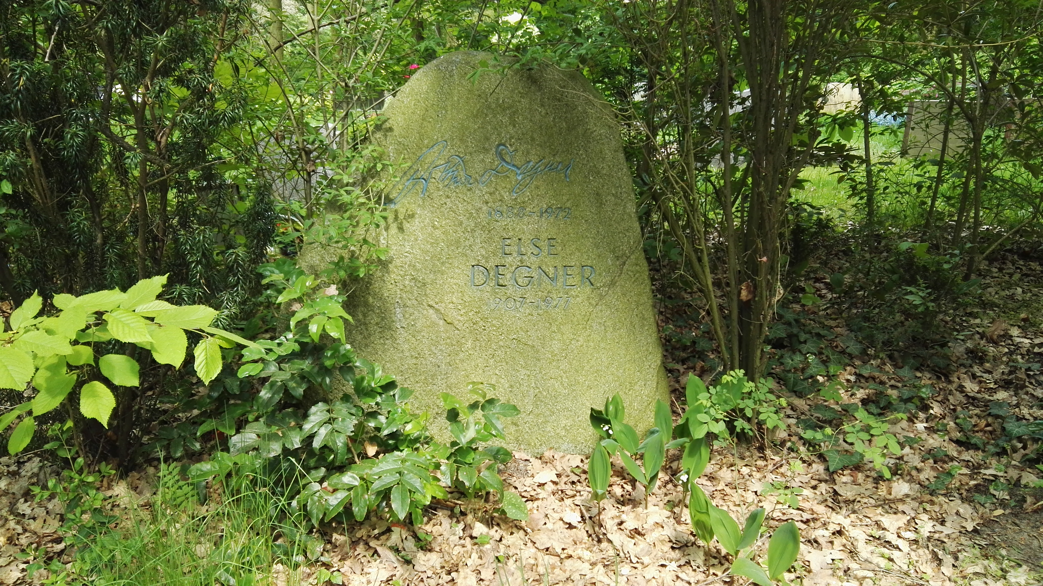 Grab von Arthur Degner auf dem Heidefriedhof in Berlin